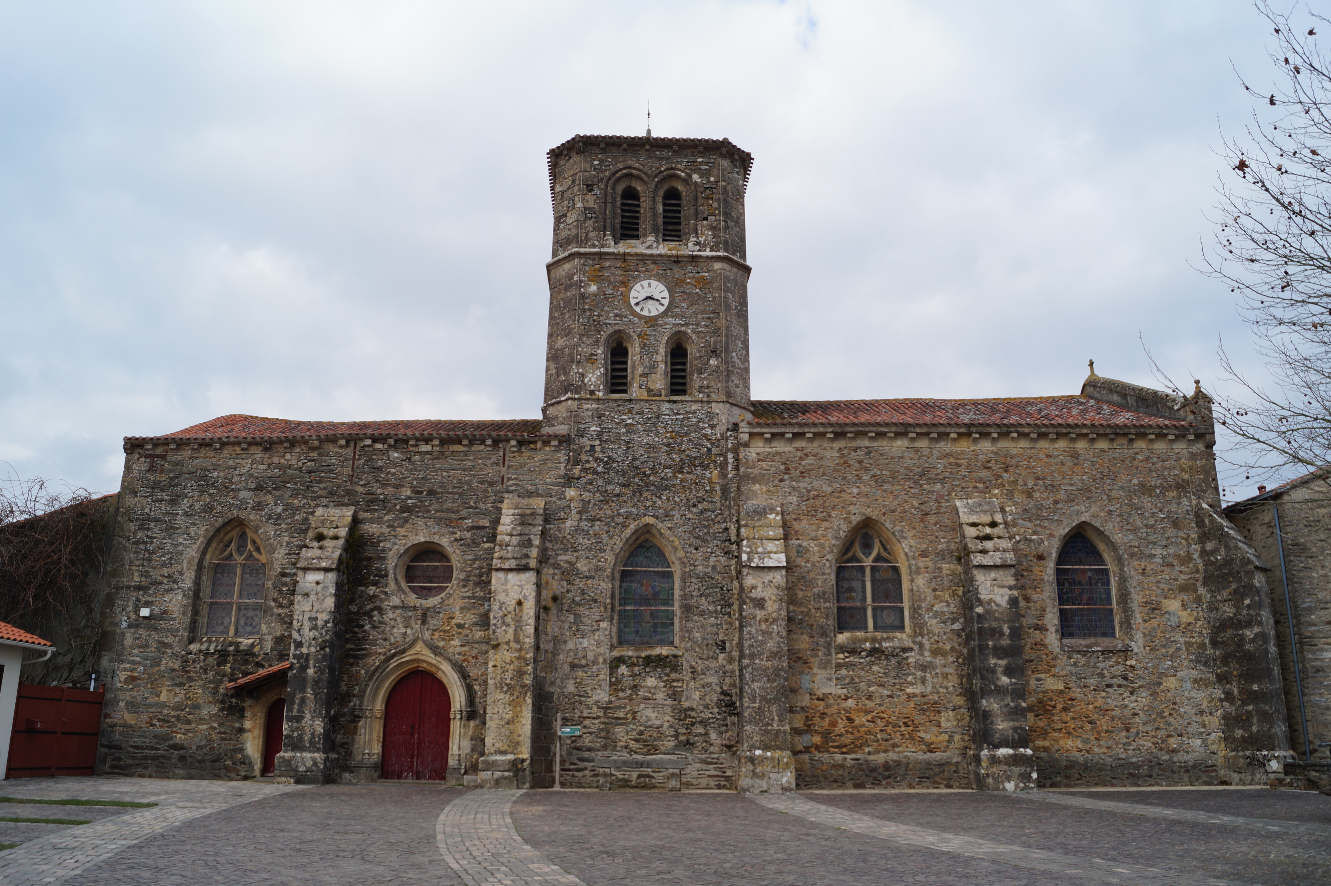 L’église Sainte-Quitterie de La Tardière.